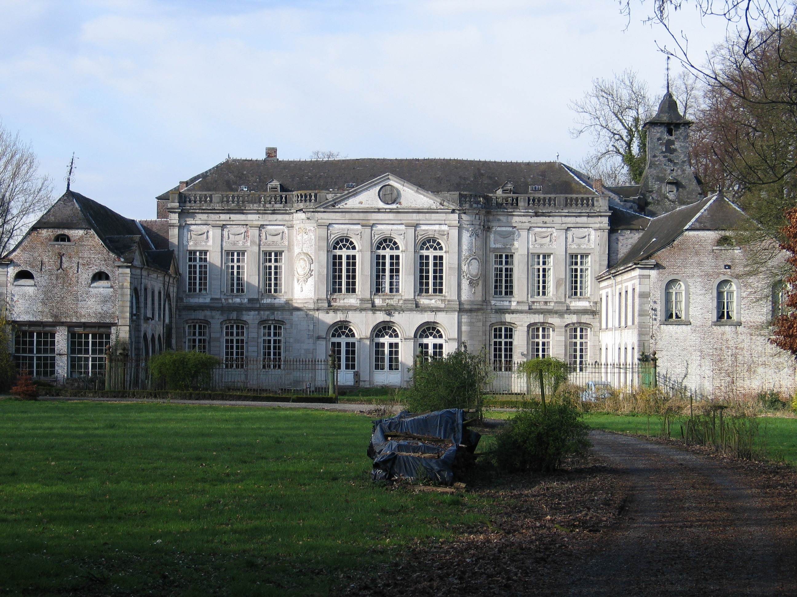 Kasteel Hasselbroek, Jeuk, België